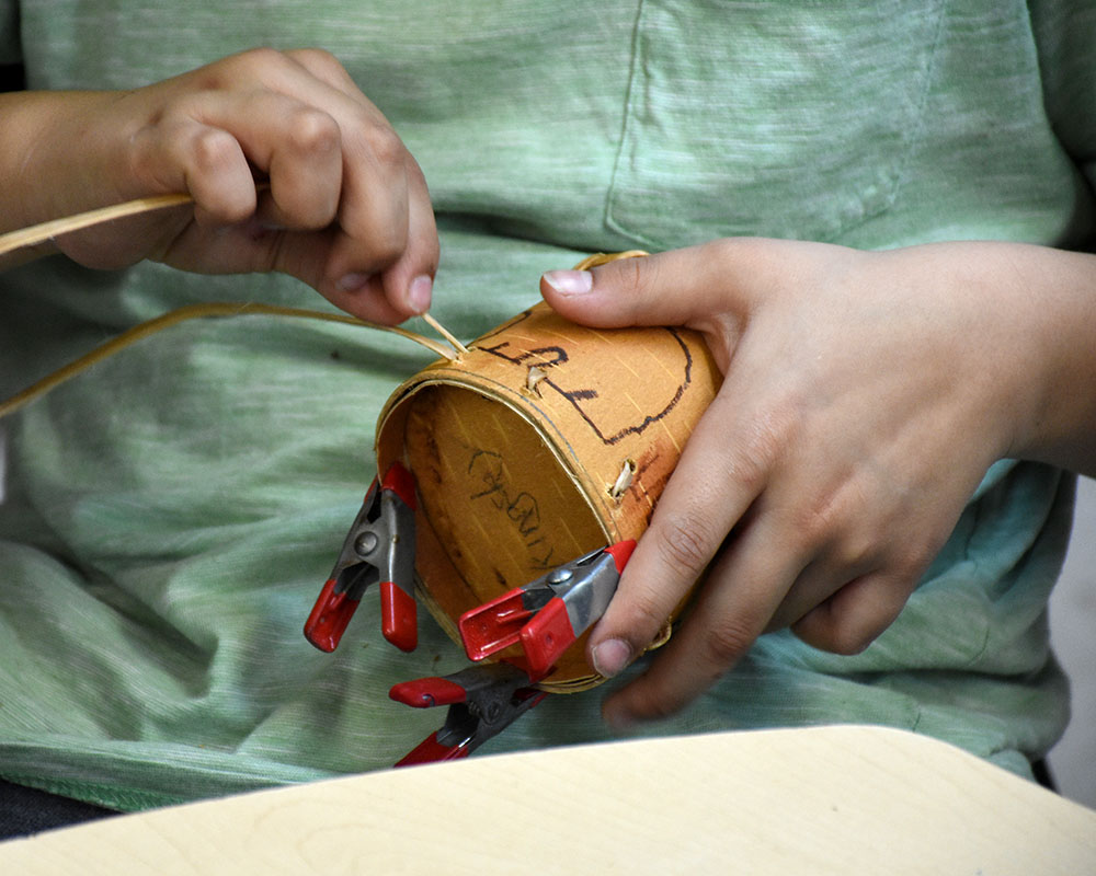 coudre le panier d'écorce